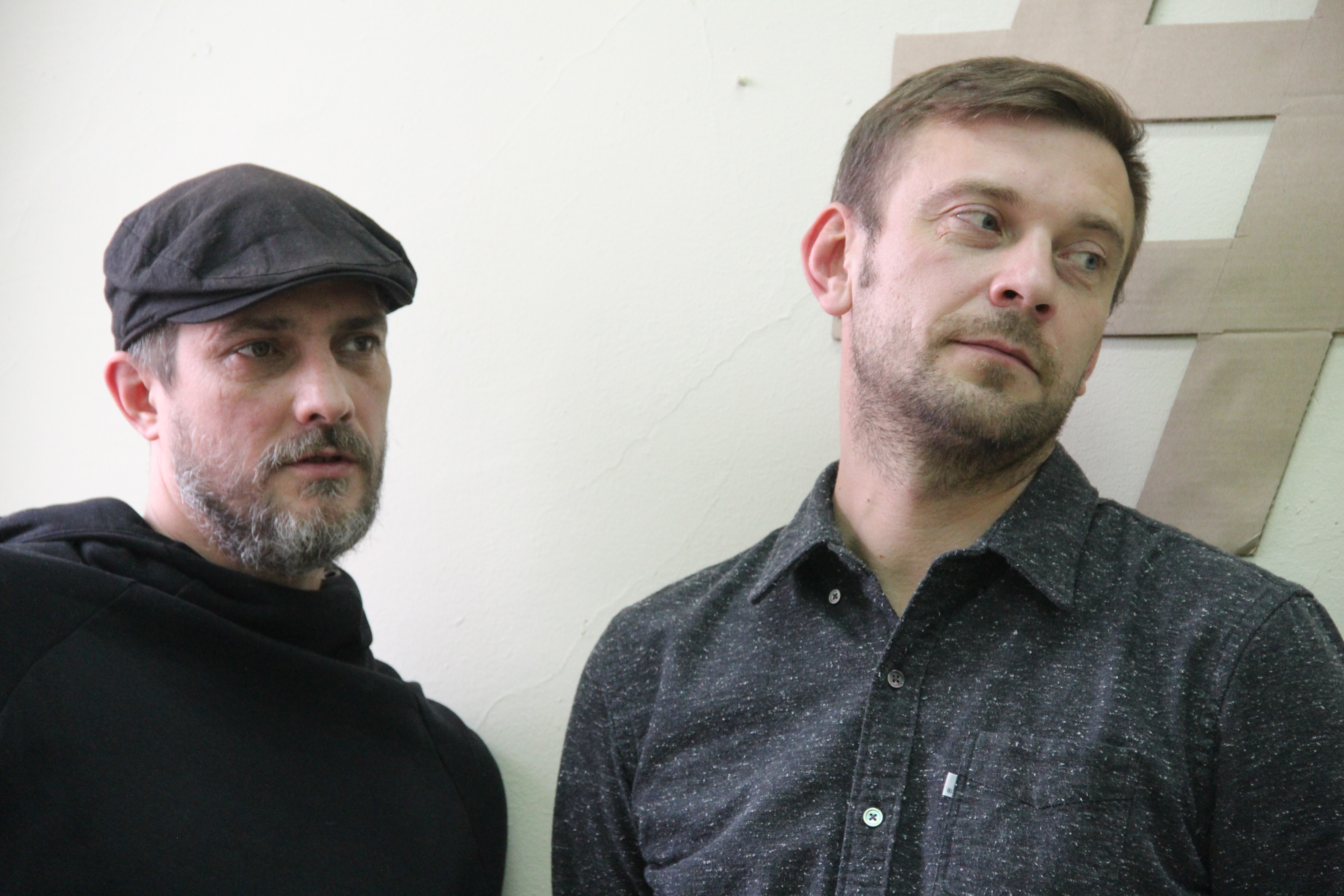 Михаил Дурненков (справа), российский писатель, драматург